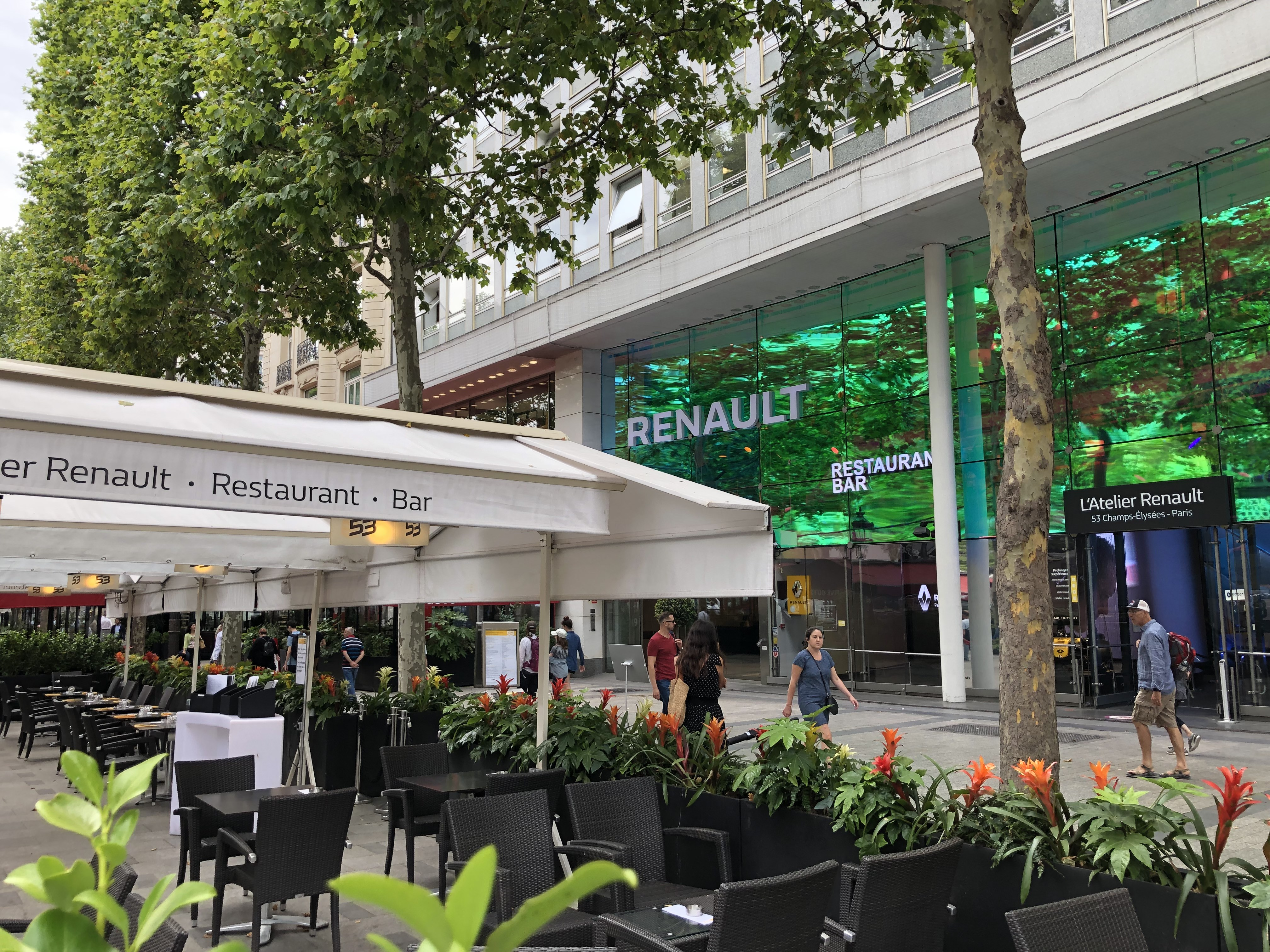 Façade de L'Atelier Renault - 53 avenue des Champs-Elysées Paris Exposition #colorfuldive